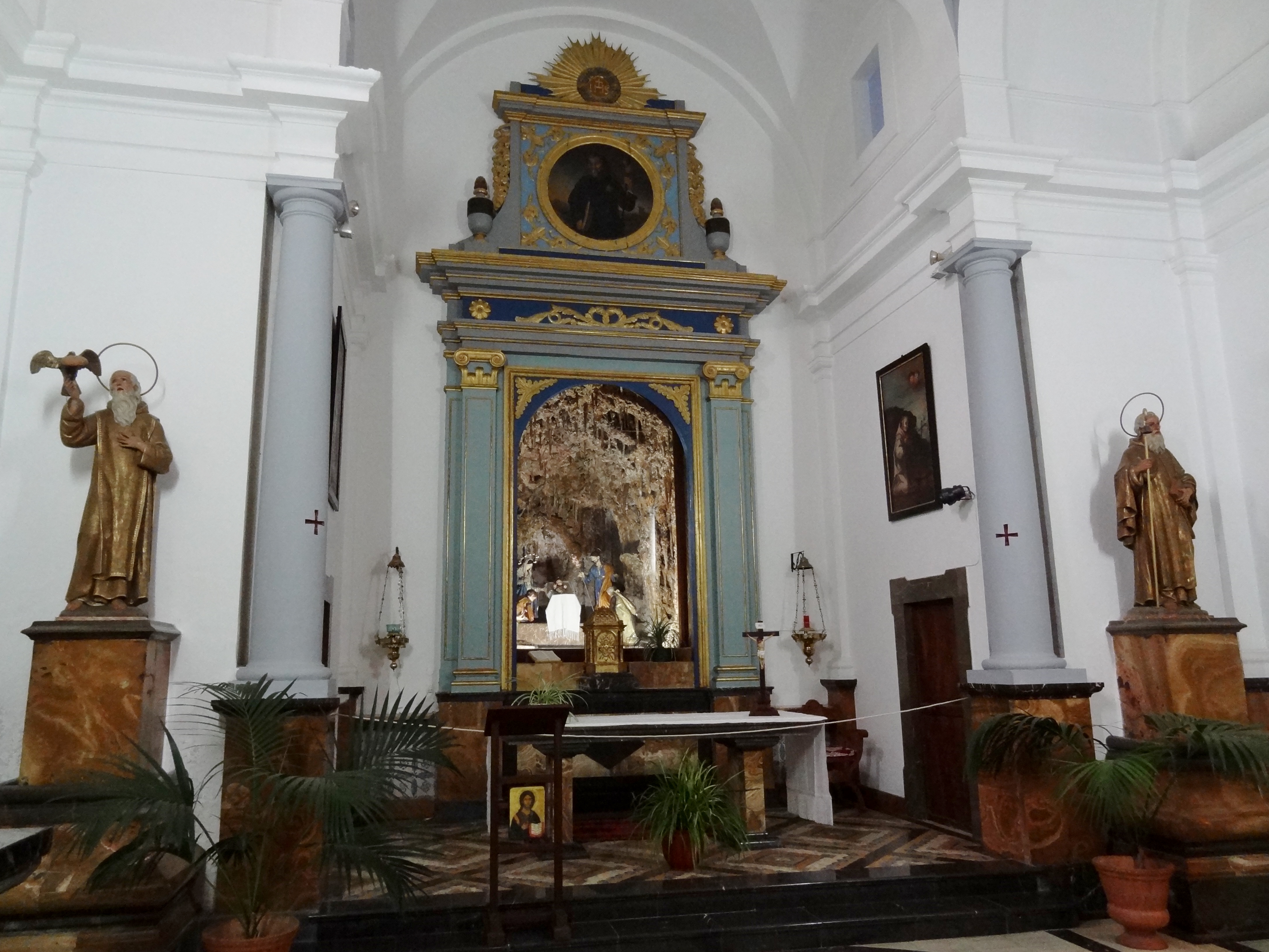 Hauptaltar der Ermita de Betlem, Gemeinde Artà, Mallorca, Spanien